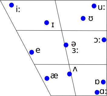 System angielskich samogłosek